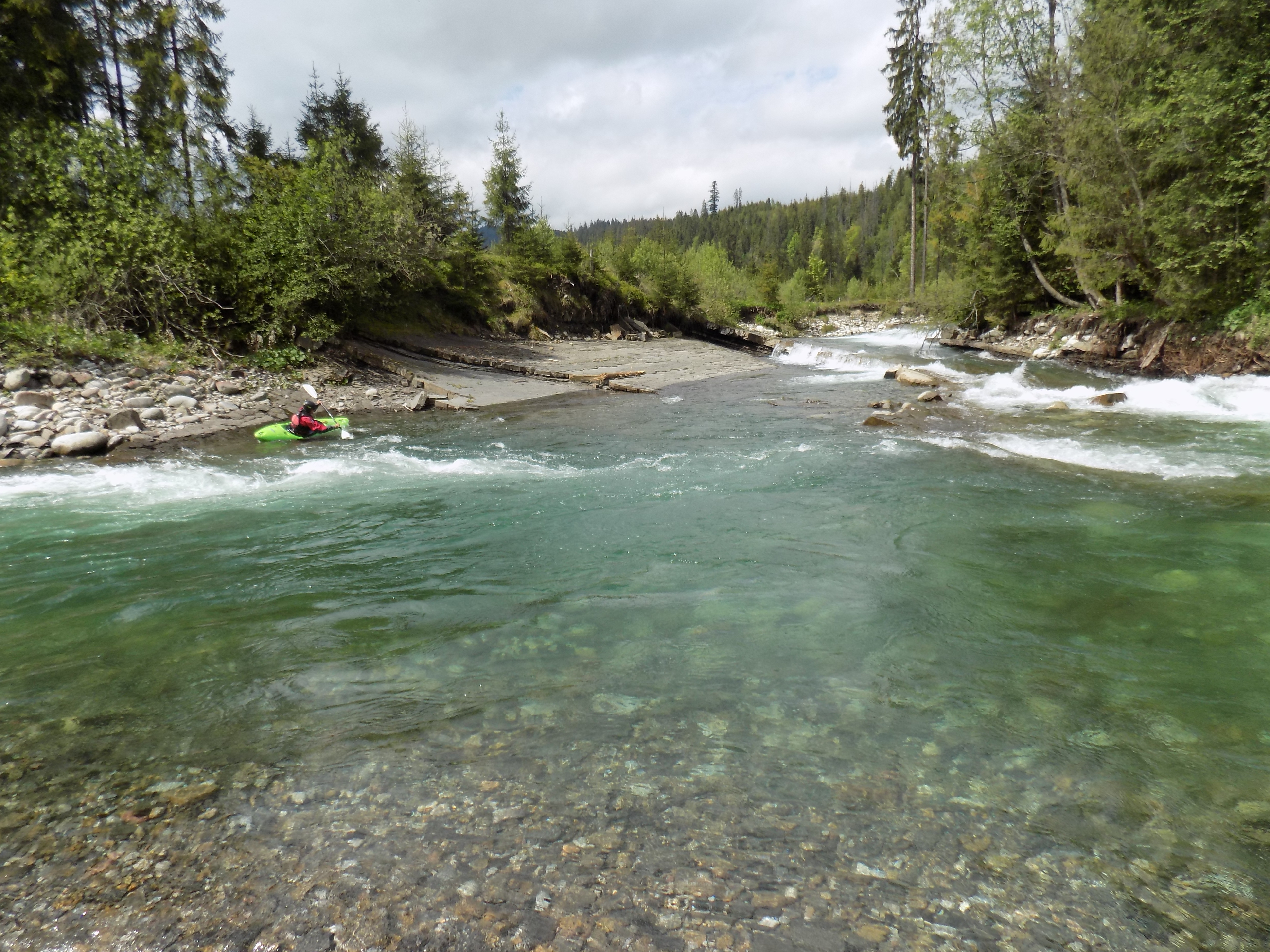 Specjalny obszar ochrony siedlisk: Dolina Białki This is a photography of protected area with CRFOP ID PL.ZIPOP.1393.N2K.PLH120024.H